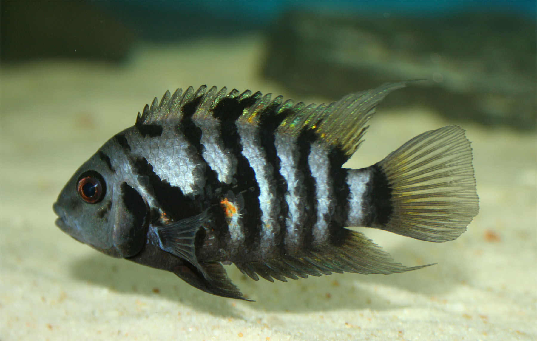 An Amatitlania nigrofasciatus male.